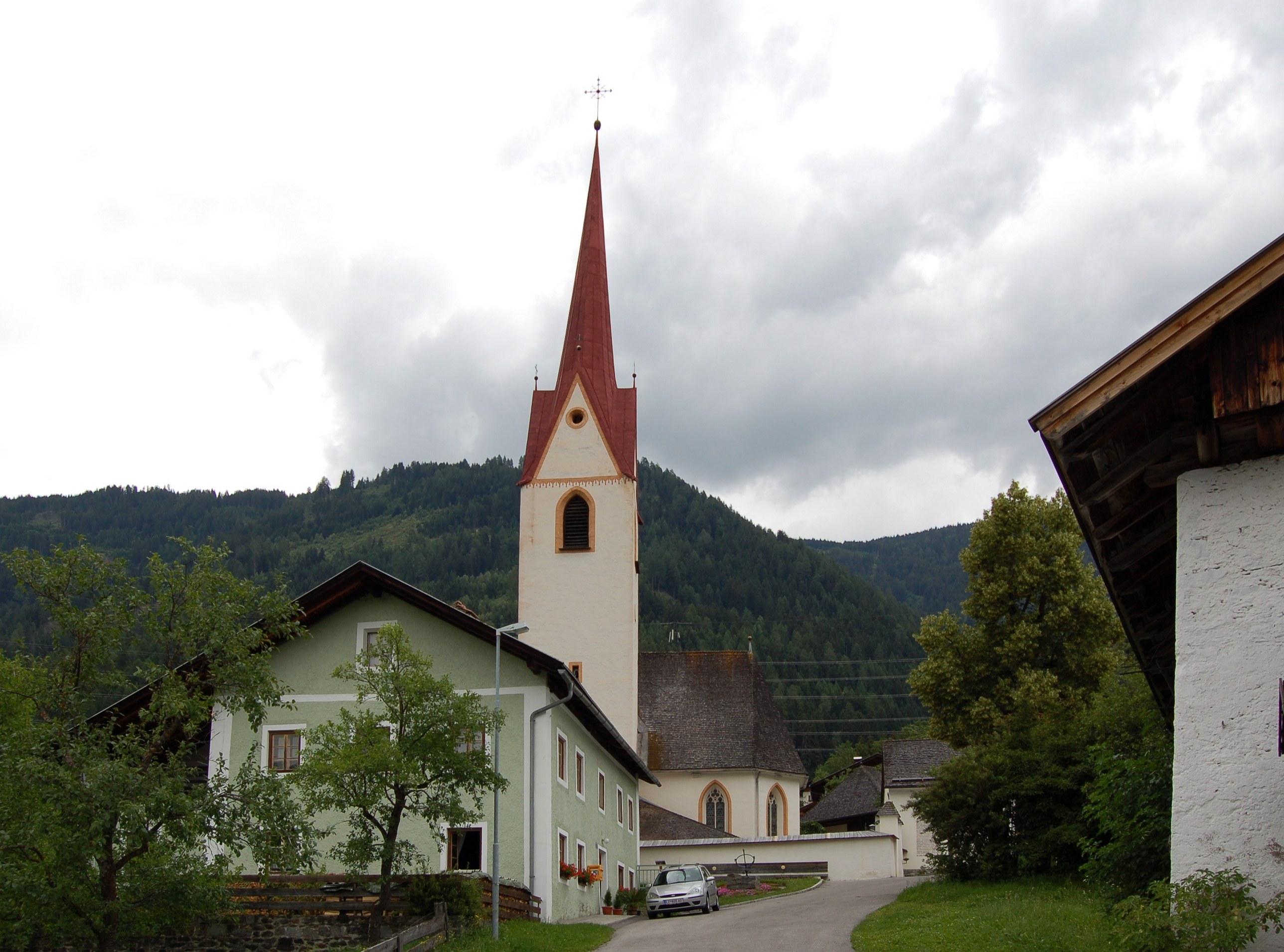 Die denkmalgeschützte Pfarrkirche in Grafendorf (Gemeinde Gaimberg) im Bezirk Lienz.